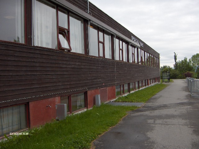 Spongdal skole